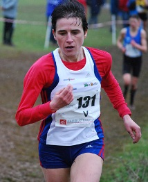 photo de Gaelle Houitte en course